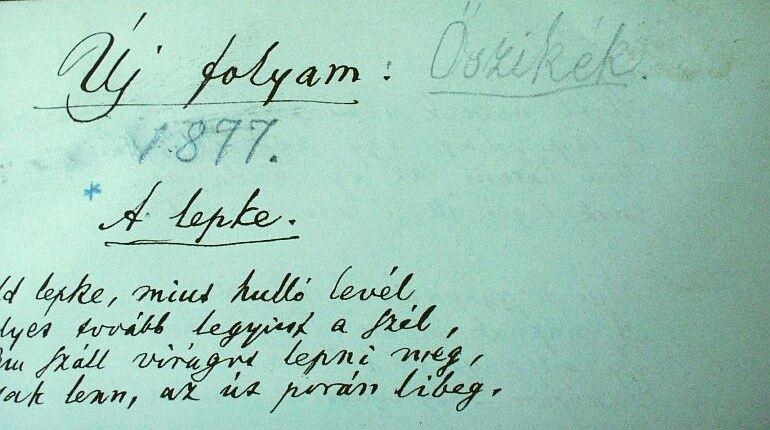 Arany János Kapcsos könyvének fotója az MTA Könyvtárának kézirattárában